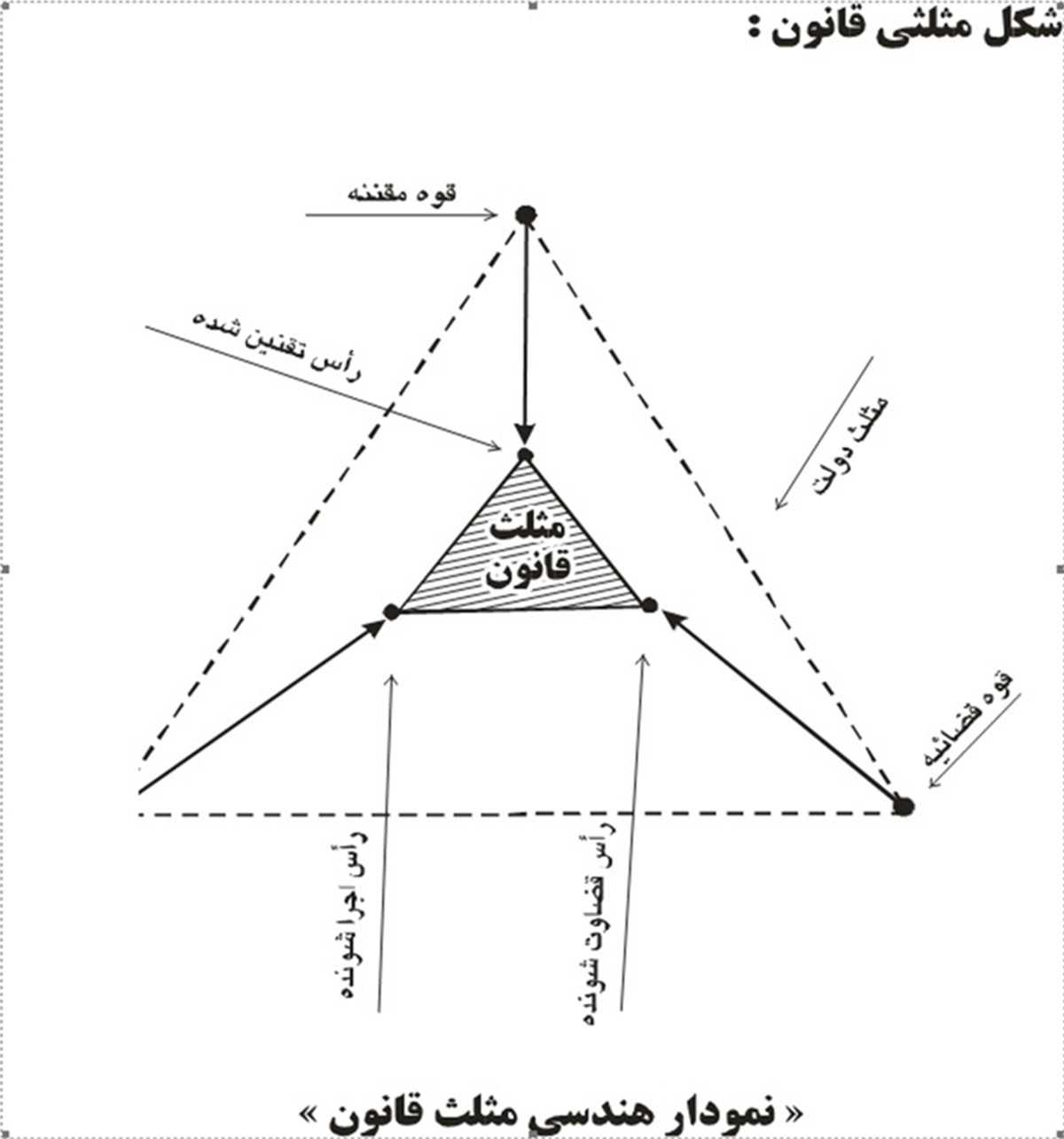 این عکس رونوشتی از یک نمودار است که از شکل نخستین آن با استفاده از ویرایش خودم به حالت در امده است